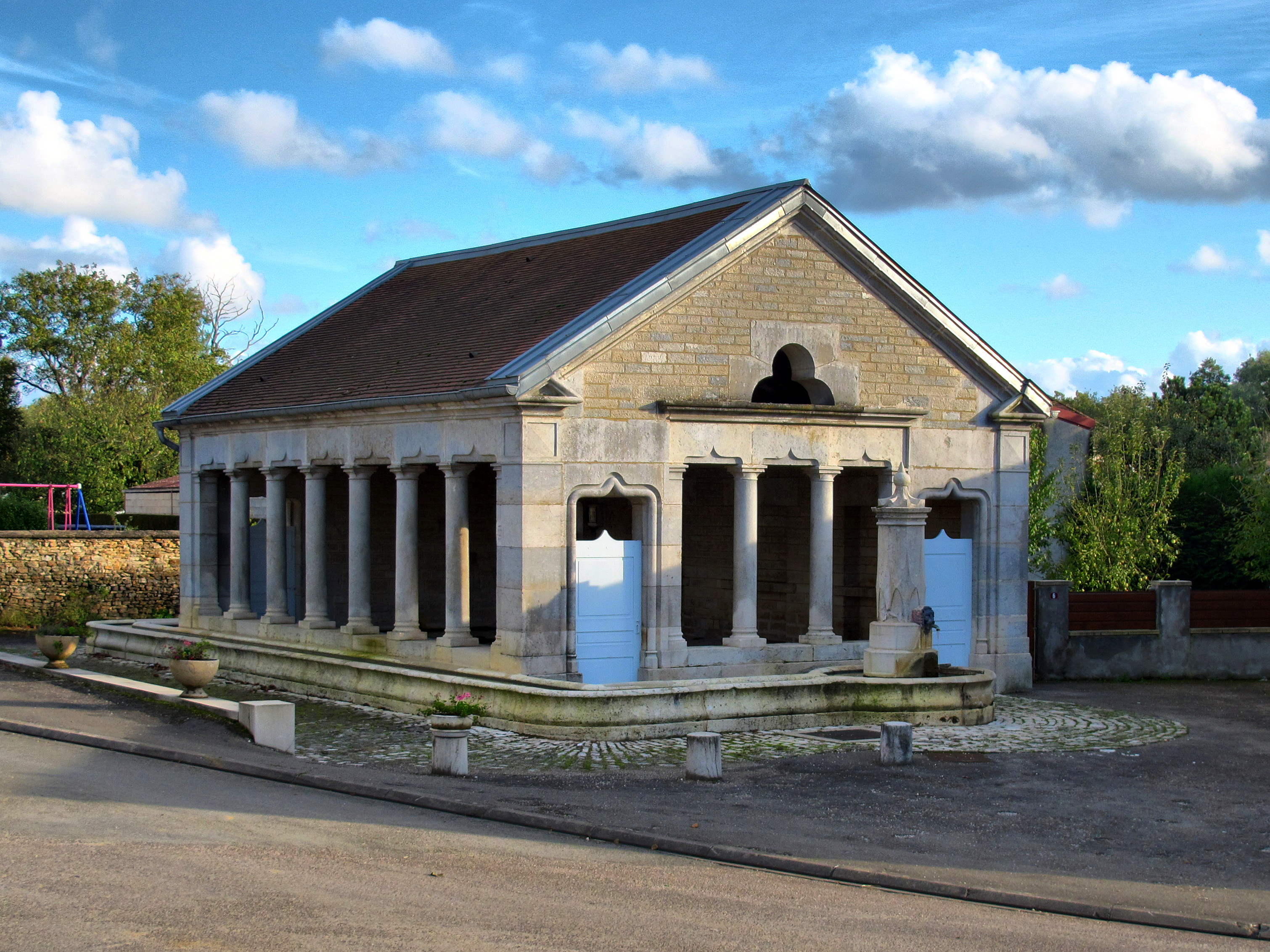 Inscrit aux monuments historiques sous le numéro PA00102311